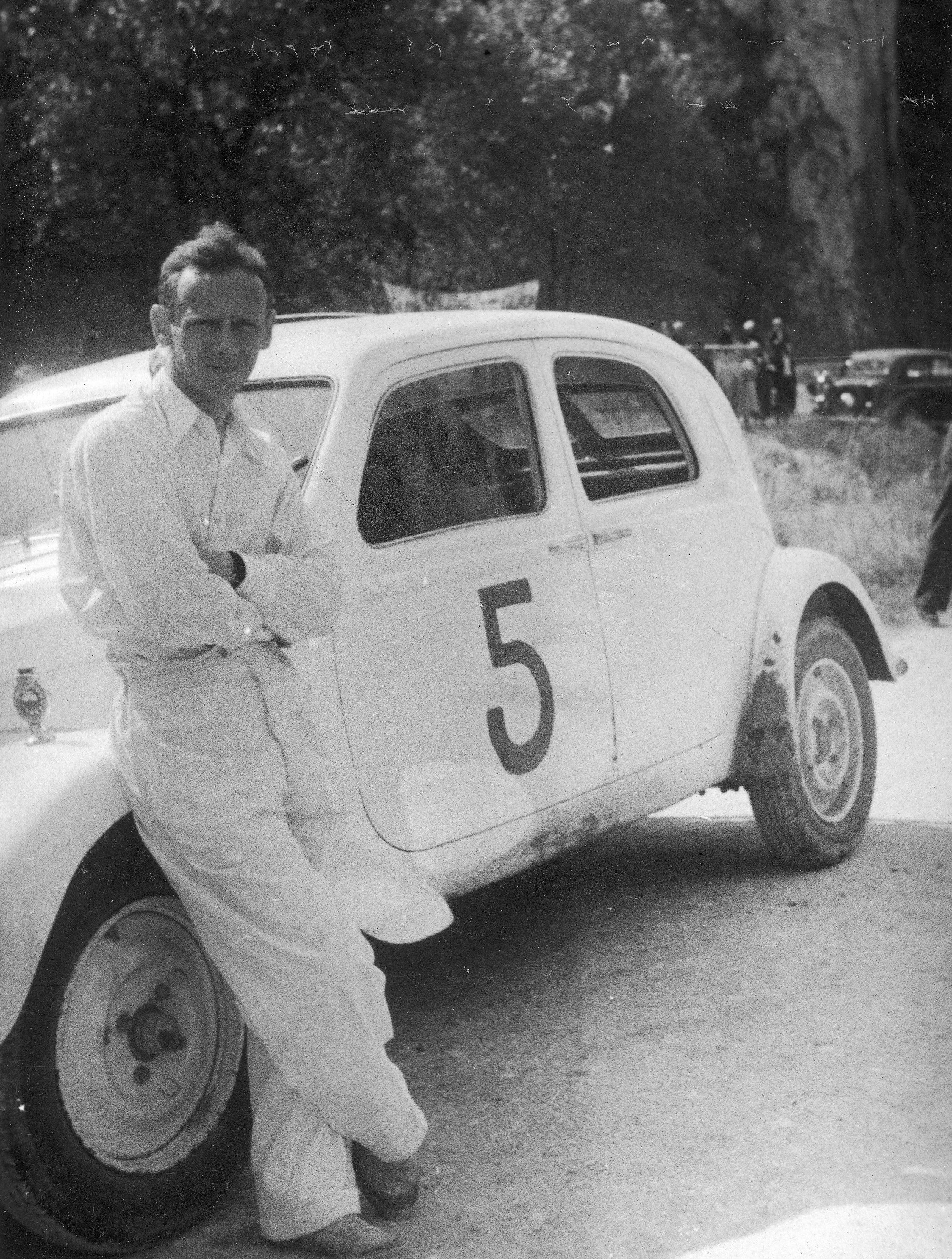 Jan Ripper (Ojców, 1939)